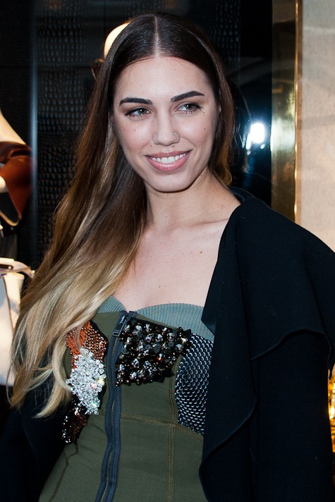 Fendi store opening - Amber Le Bon